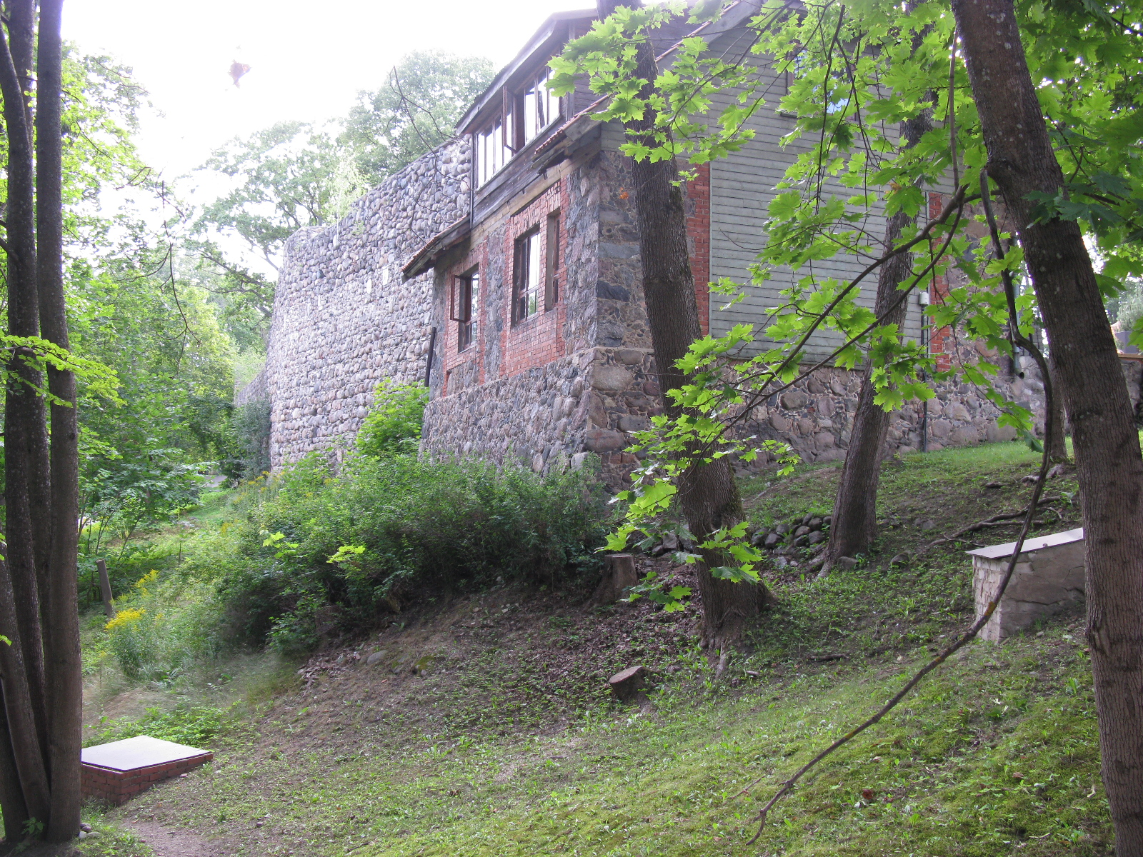 Kohvikuhoone asetseb otse keset kunagist kaitsemüüri.